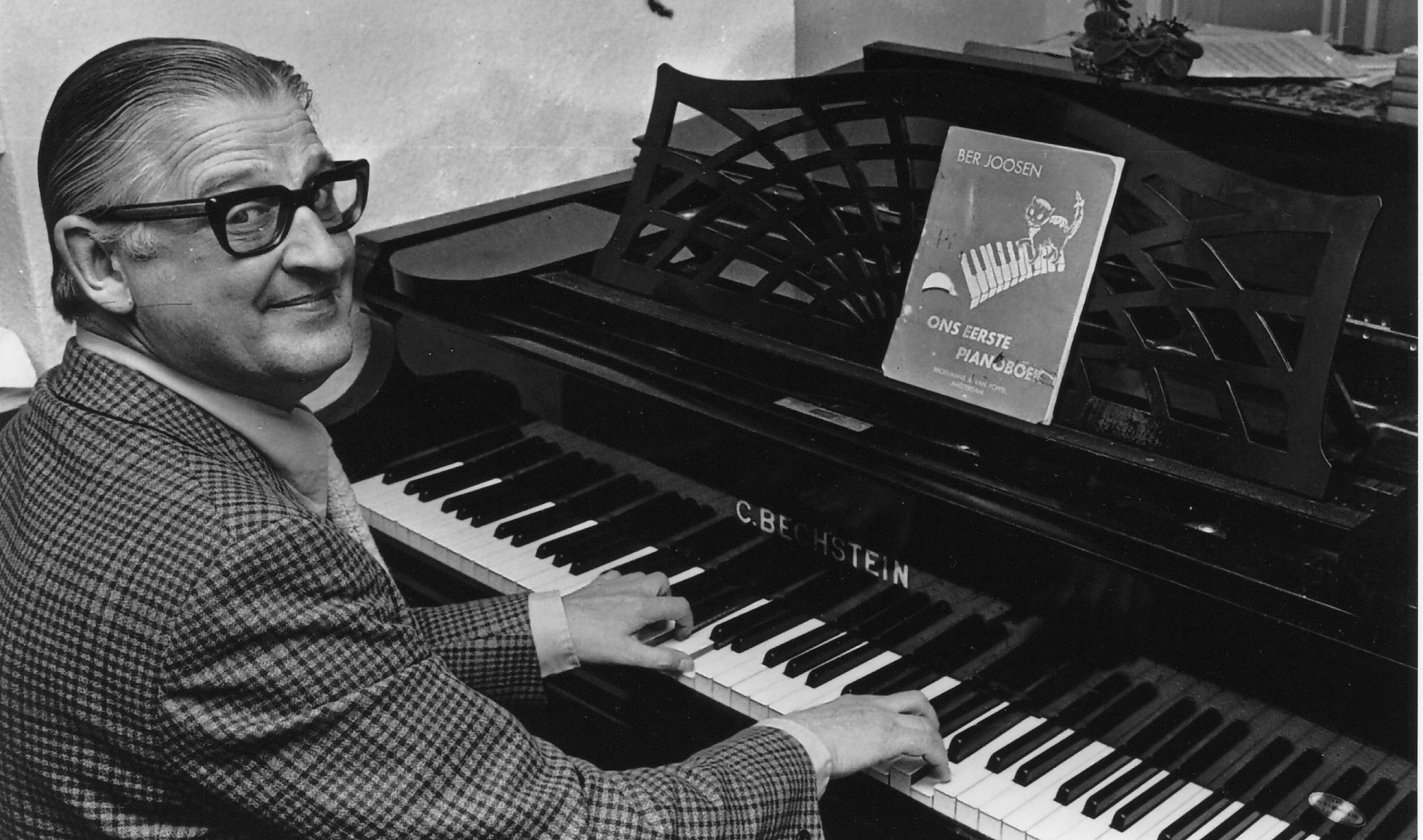 Ber Joosen (1975)